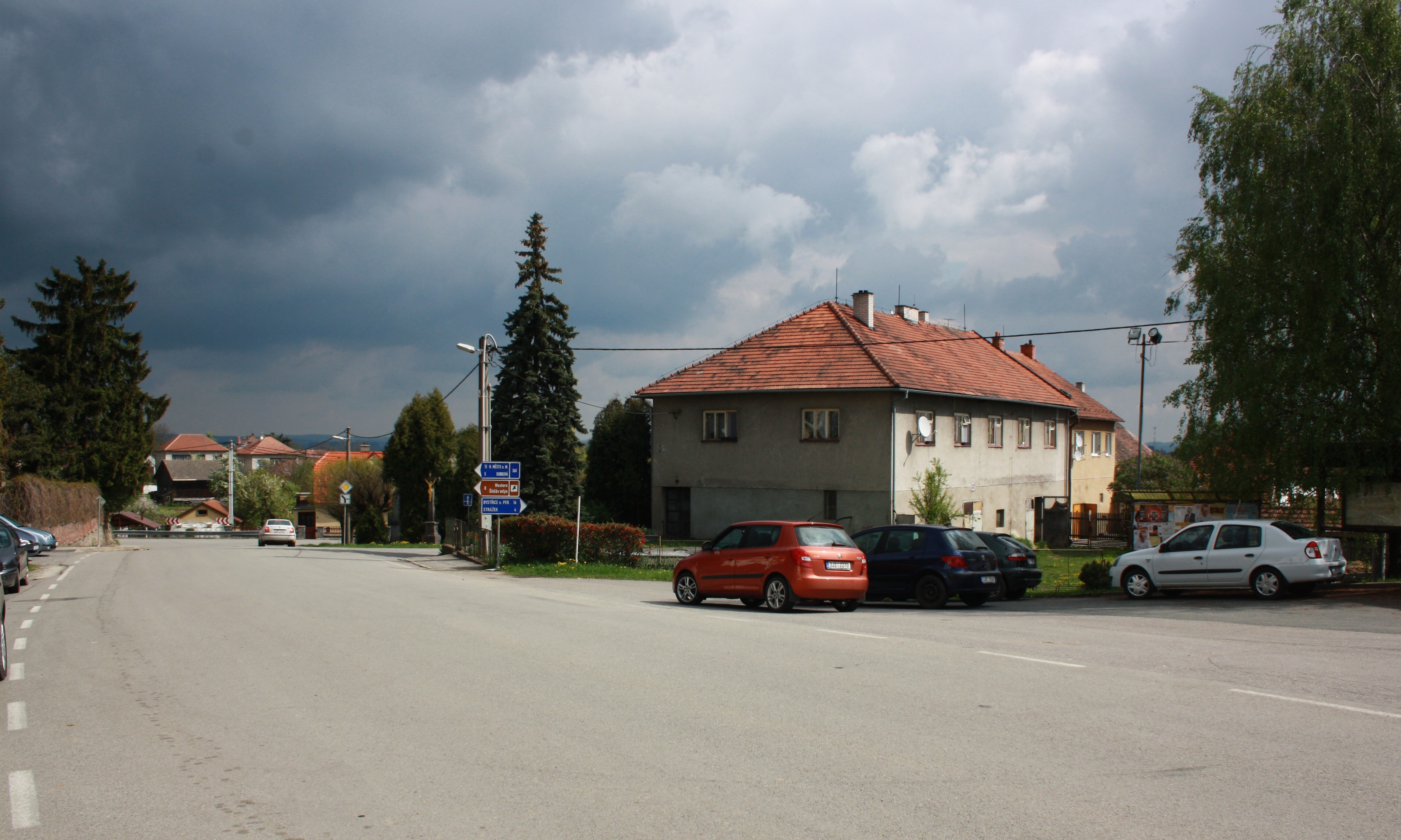 Moravec - pohled od kostela směrem SSV This photograph was taken within the scope of the 'Czech Municipalities Photographs' grant. This photograph was taken with a DSLR from WMCZ's Camera grant.